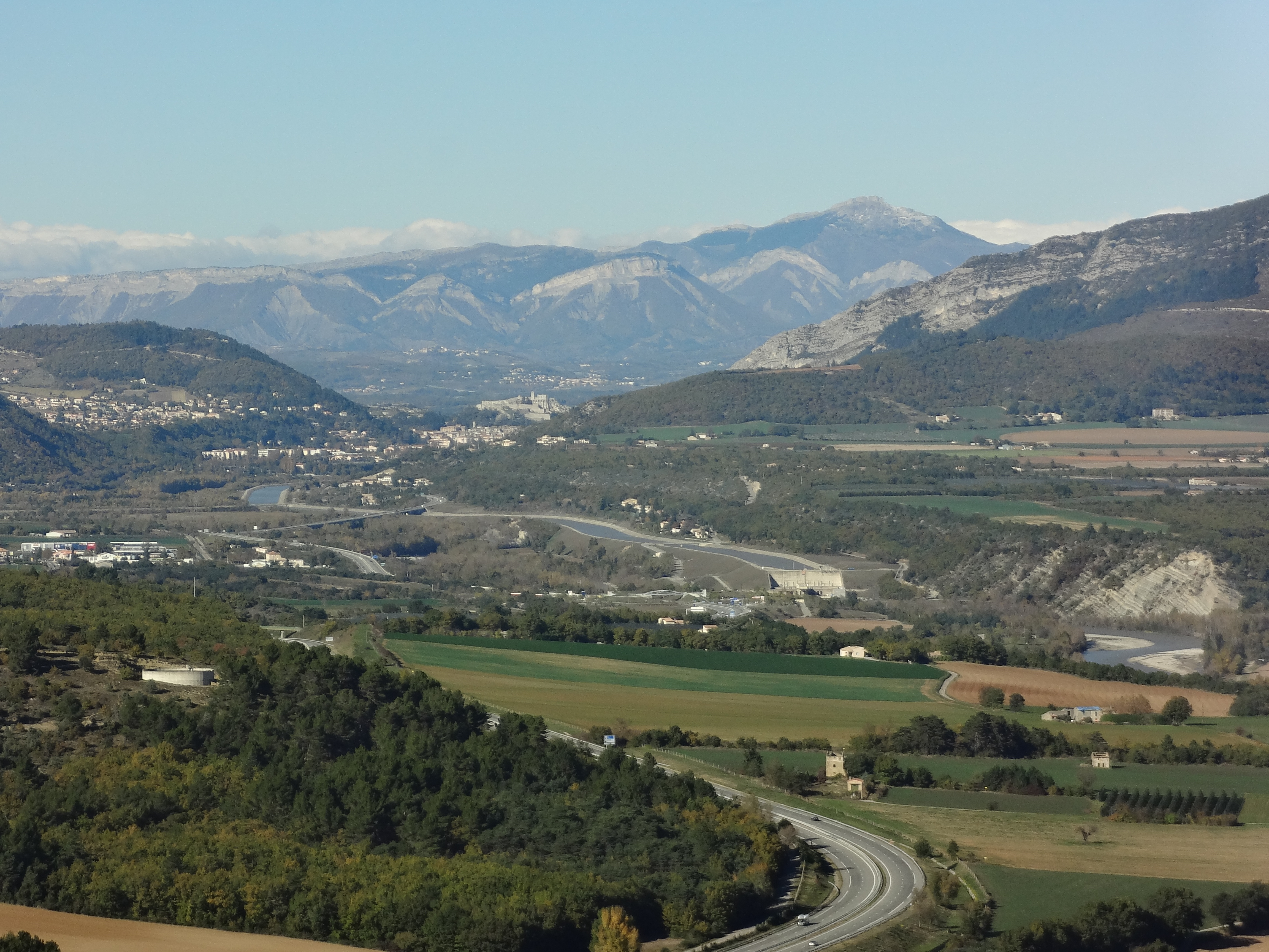 plaine de Château-Arnoux-Saint-Auban (à gauche-ouest), Salignac (à droite), citadelle de Sisteron, montagne de la Baume, La Céüse au fond (2016 m)